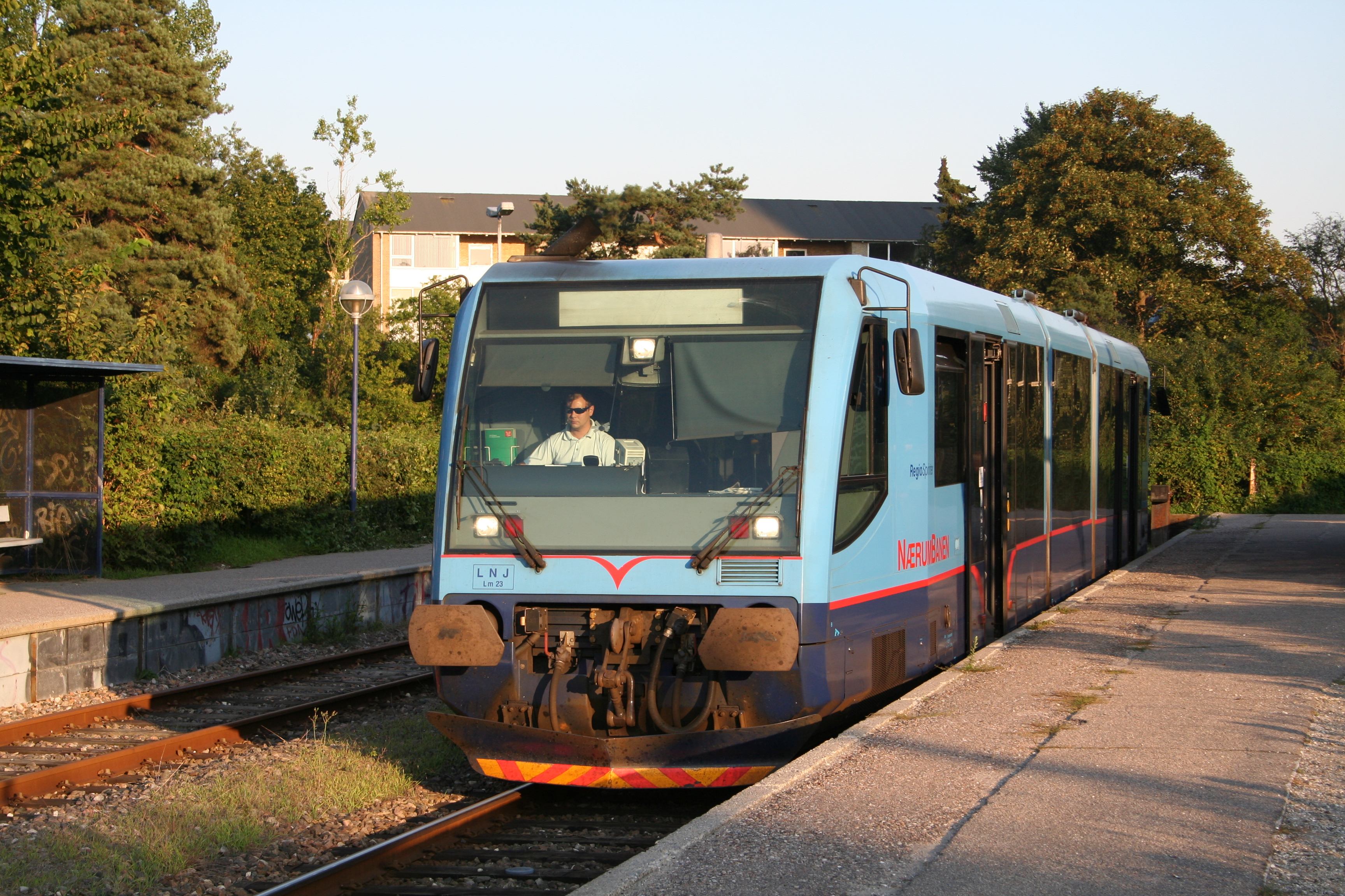 Lm 23, one of Nærumbanen's RegioSprinter trains, just before departure from Jægersborg station.